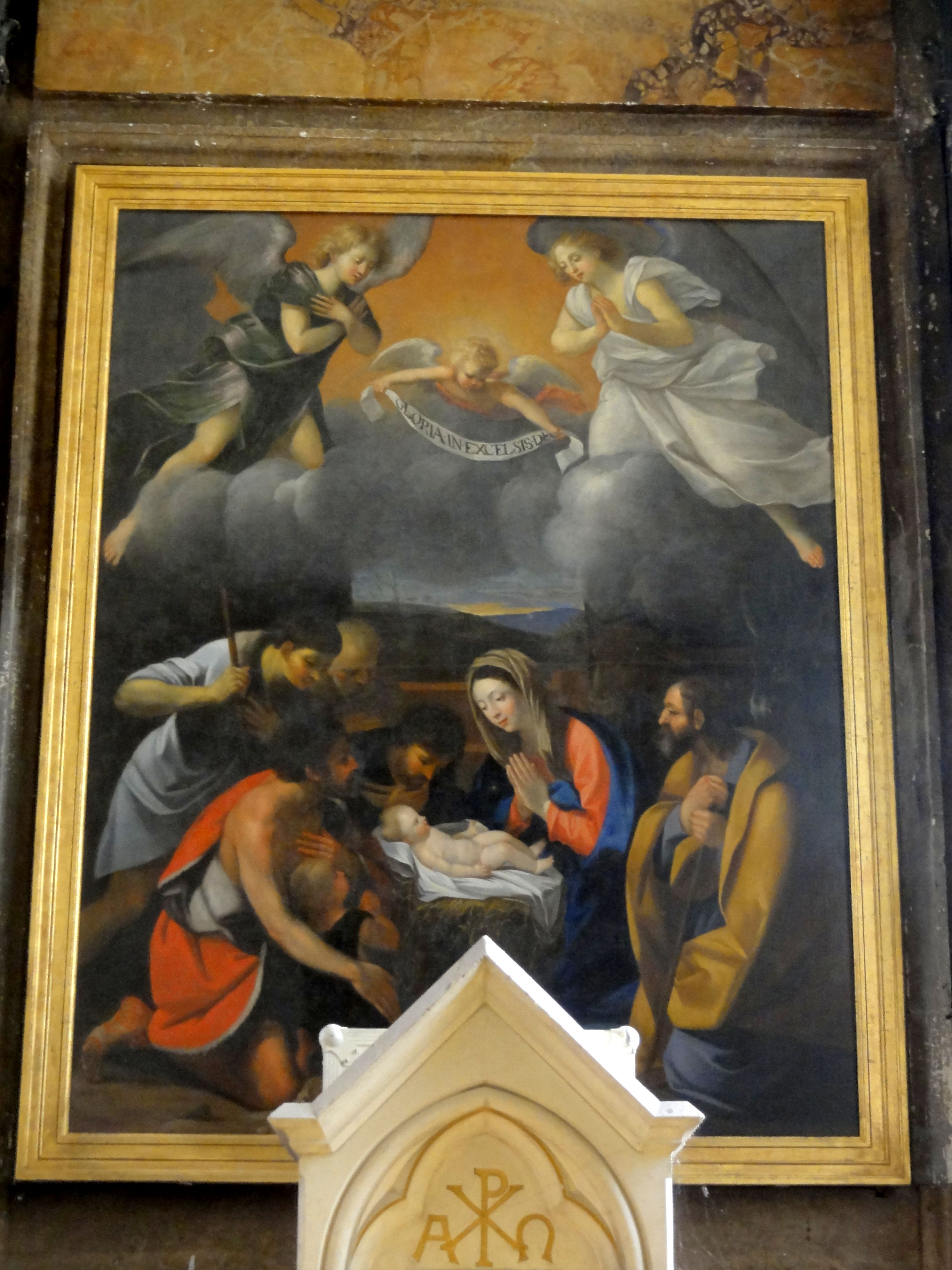 Retable du maître-autel - Nativité.